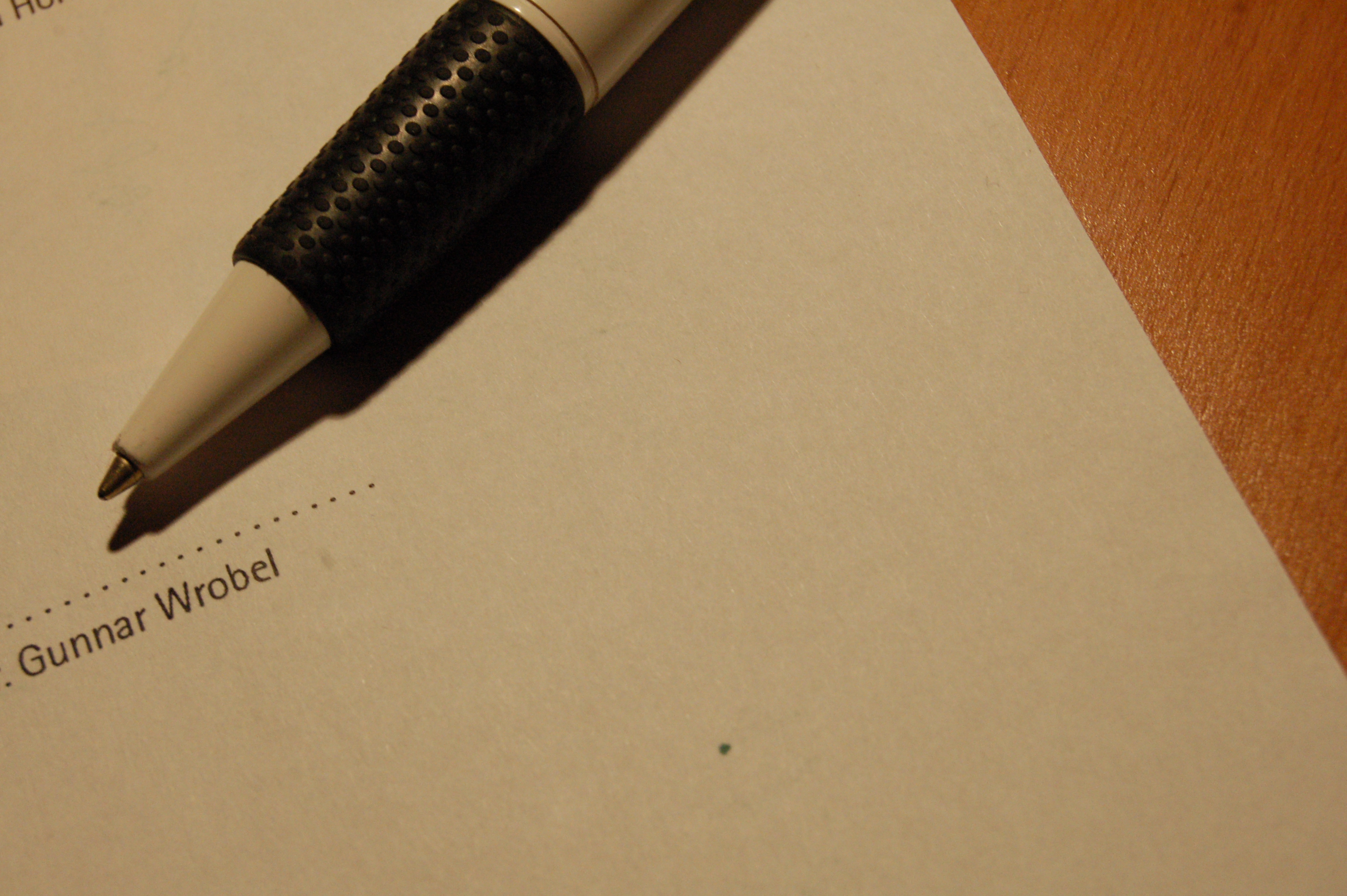 Blog entry